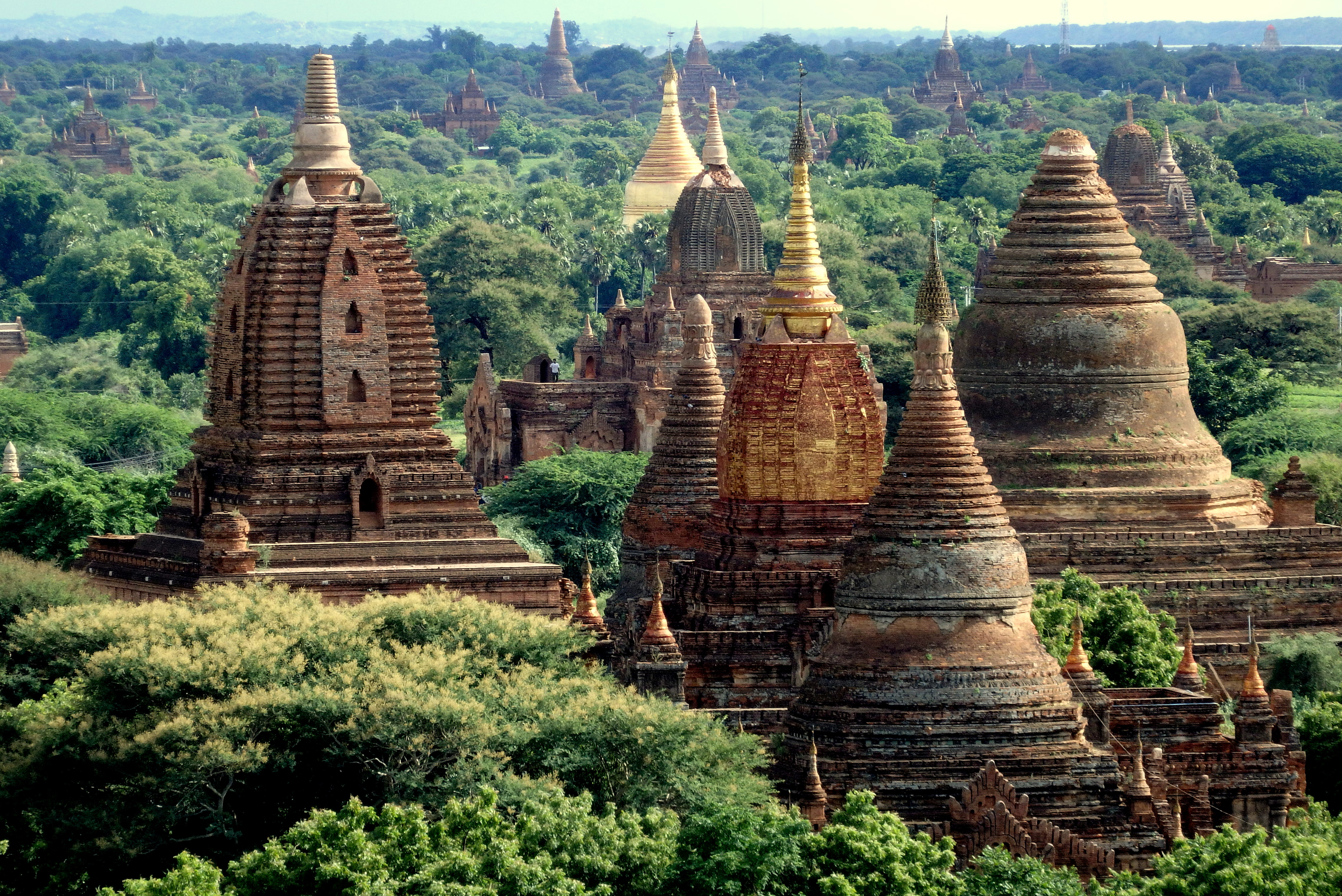 Old Bagan, Myanmar (Burma)